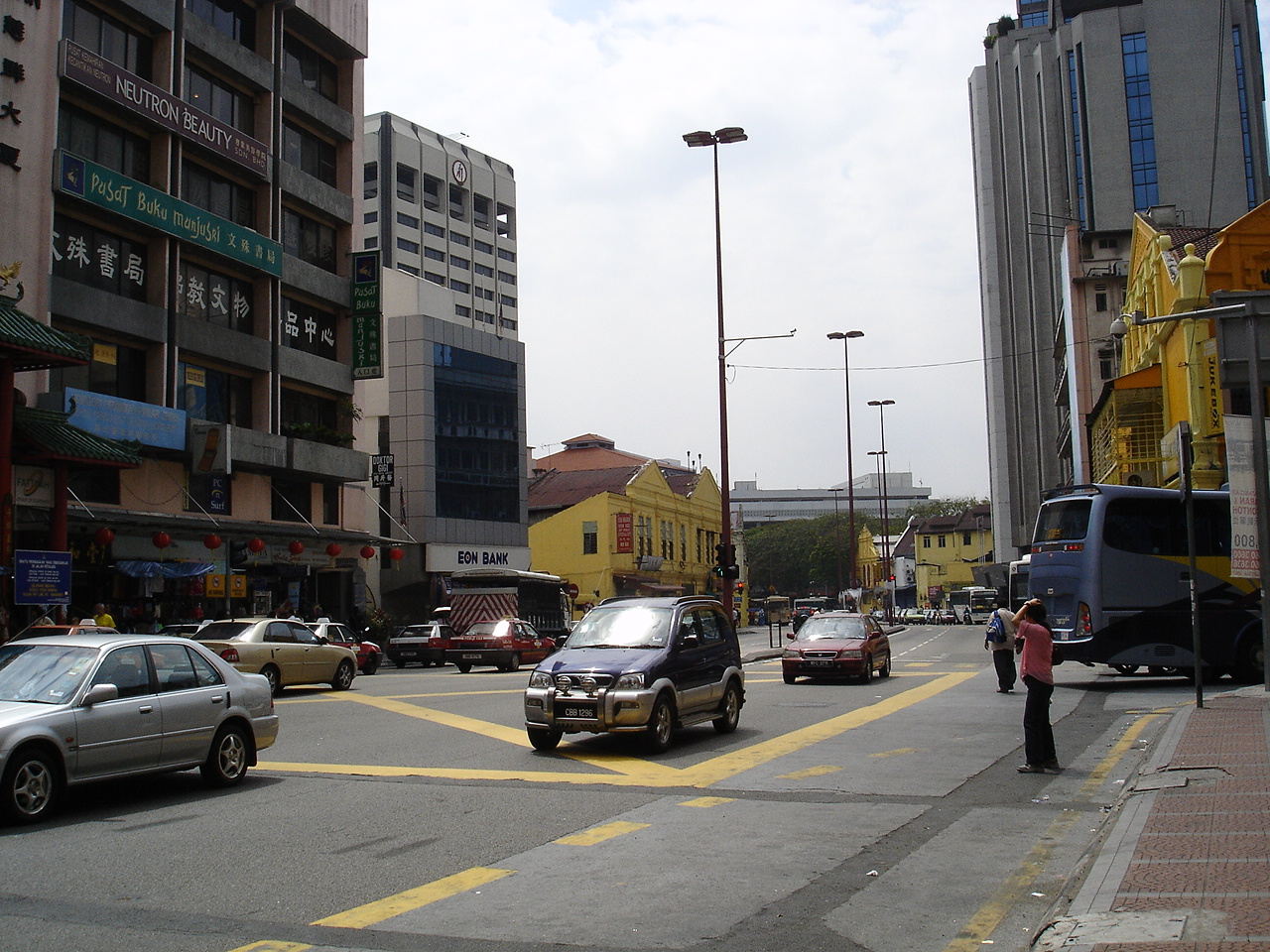 Jalan Tun Tan Cheng Lock in downtown Kuala Lumpur.